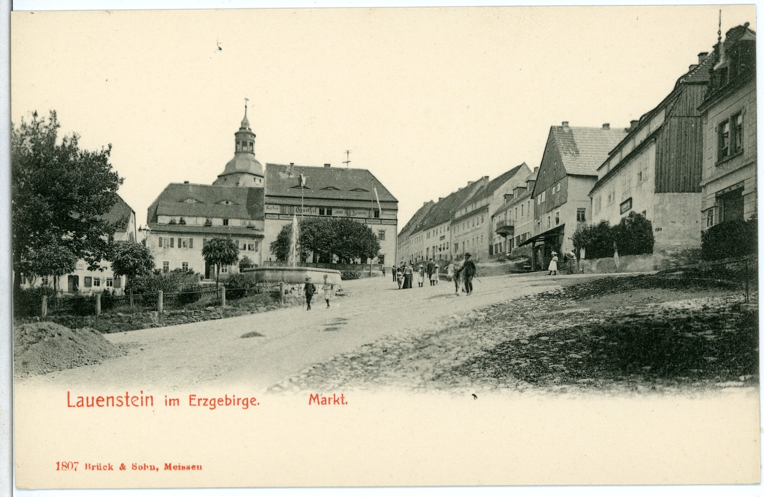 Lauenstein; Marktplatz This postcard is from publisher Brück & Sohn in Meißen ( This postcard has a unique number 01807 and is available in a higher resolution at the publisher. This images was uploaded in a cooperation project between Wikipedians and the publisher.